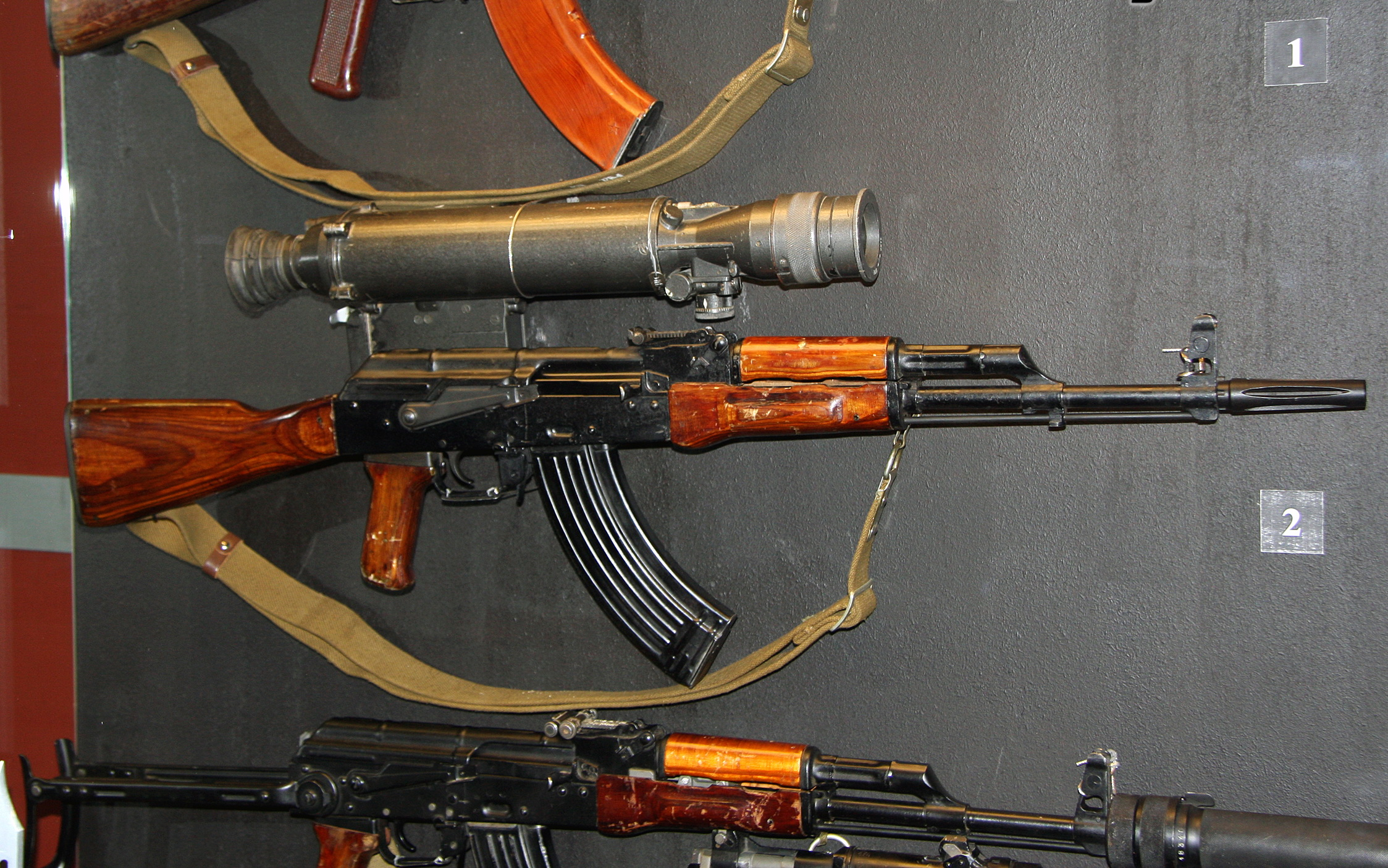 АКМЛ с НПС-3